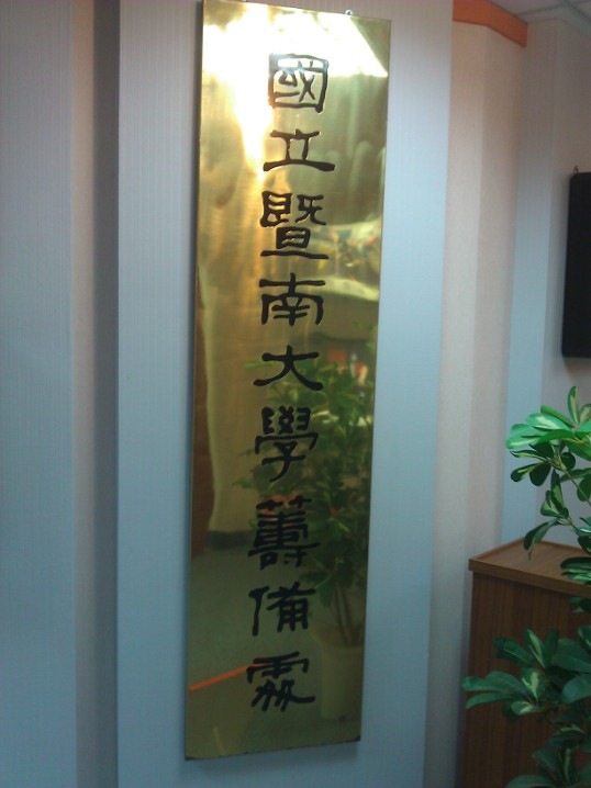 中文（台灣）: 國立暨南大學籌備處立牌。